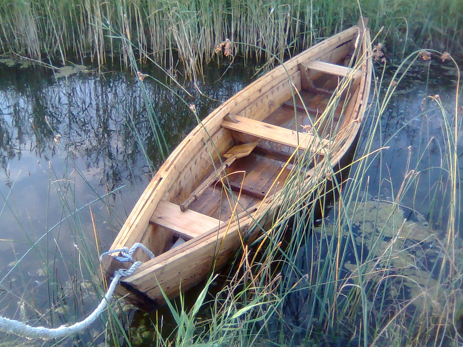 Vast valminund ruup Läänemaal Haeska külas.